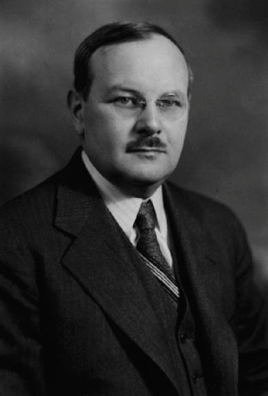 Edgar Rochette, Quebec politician